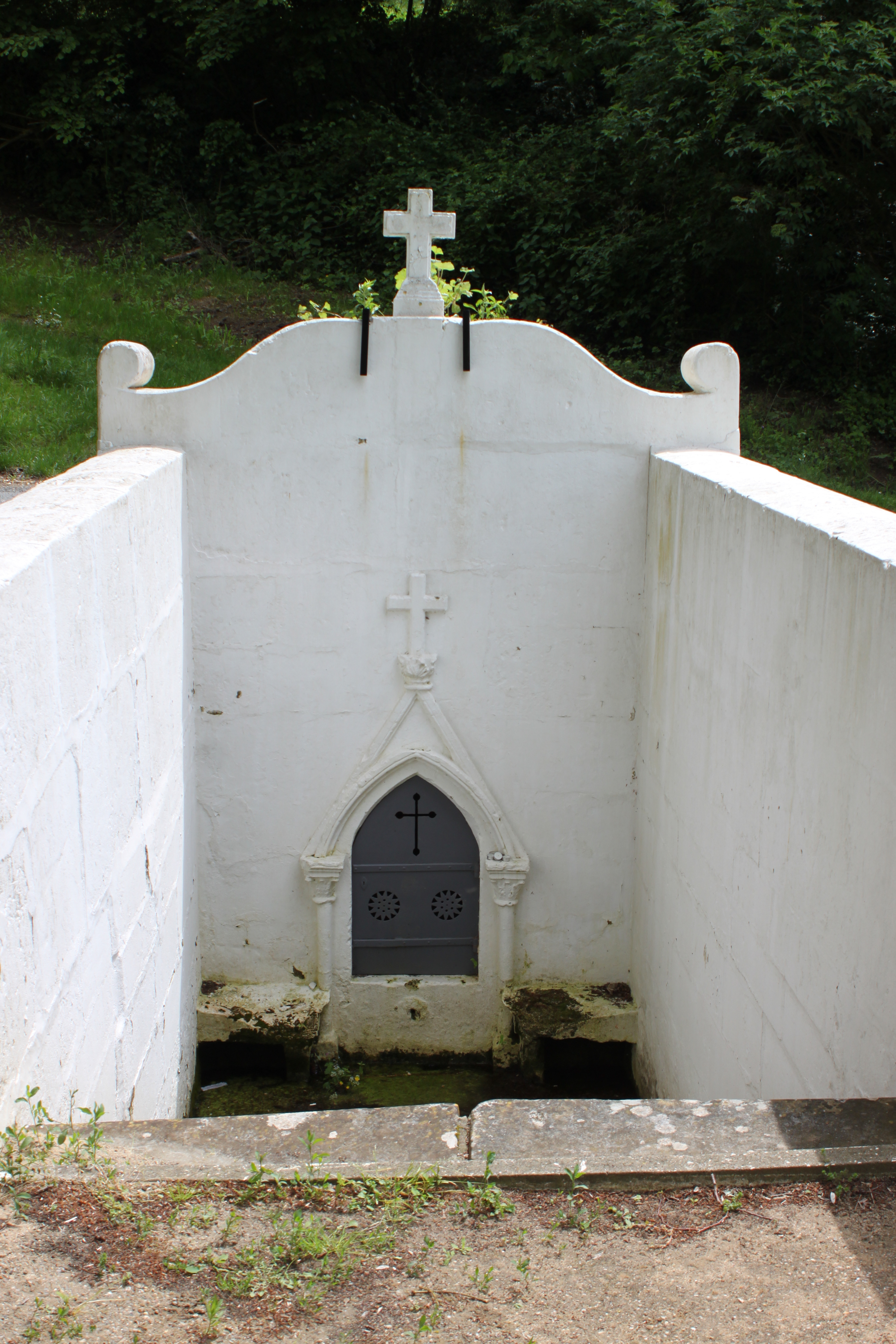 Fontaine, Fr-17-La Gripperie-Saint-Symphorien.